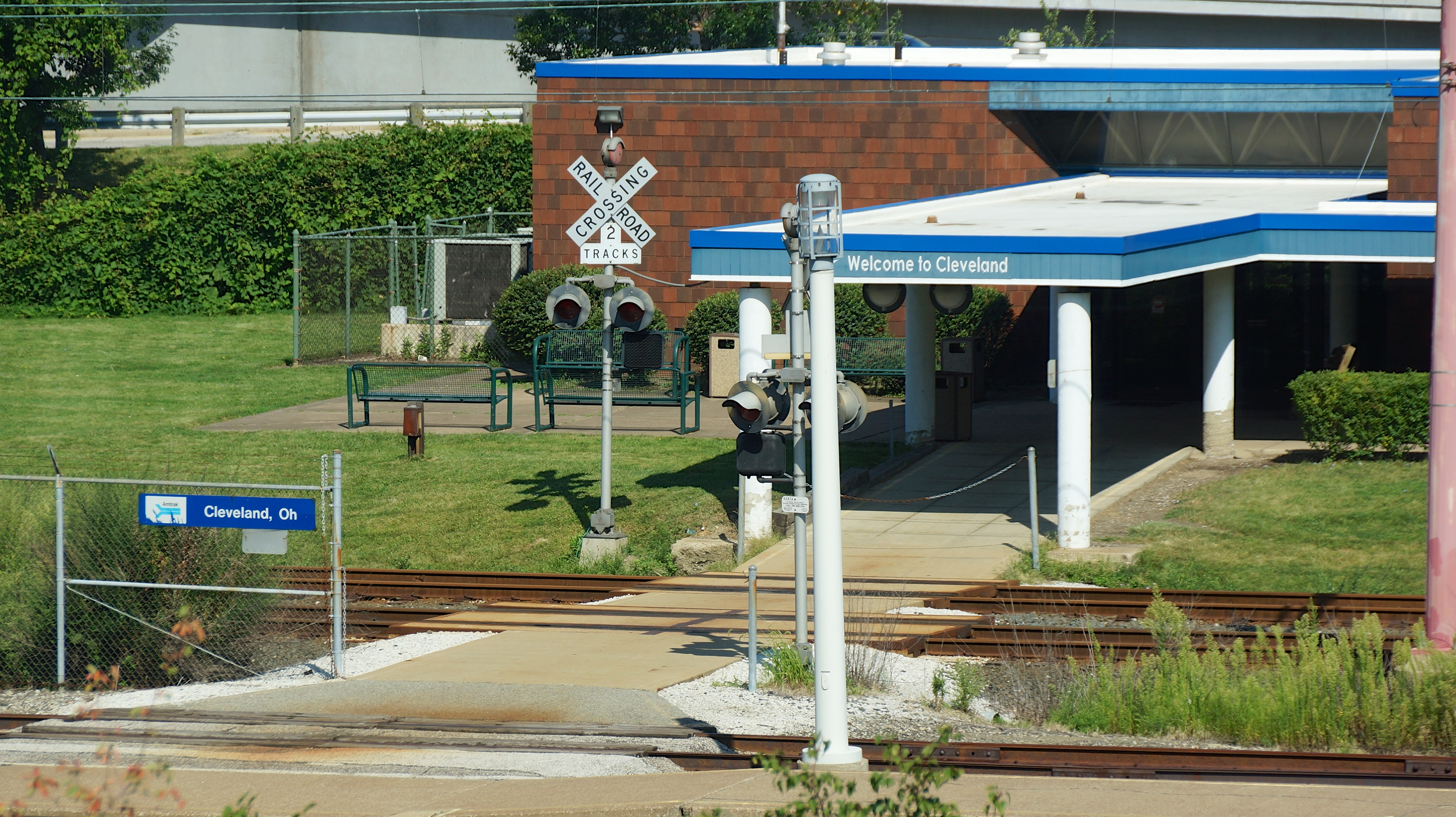 Amtrak station